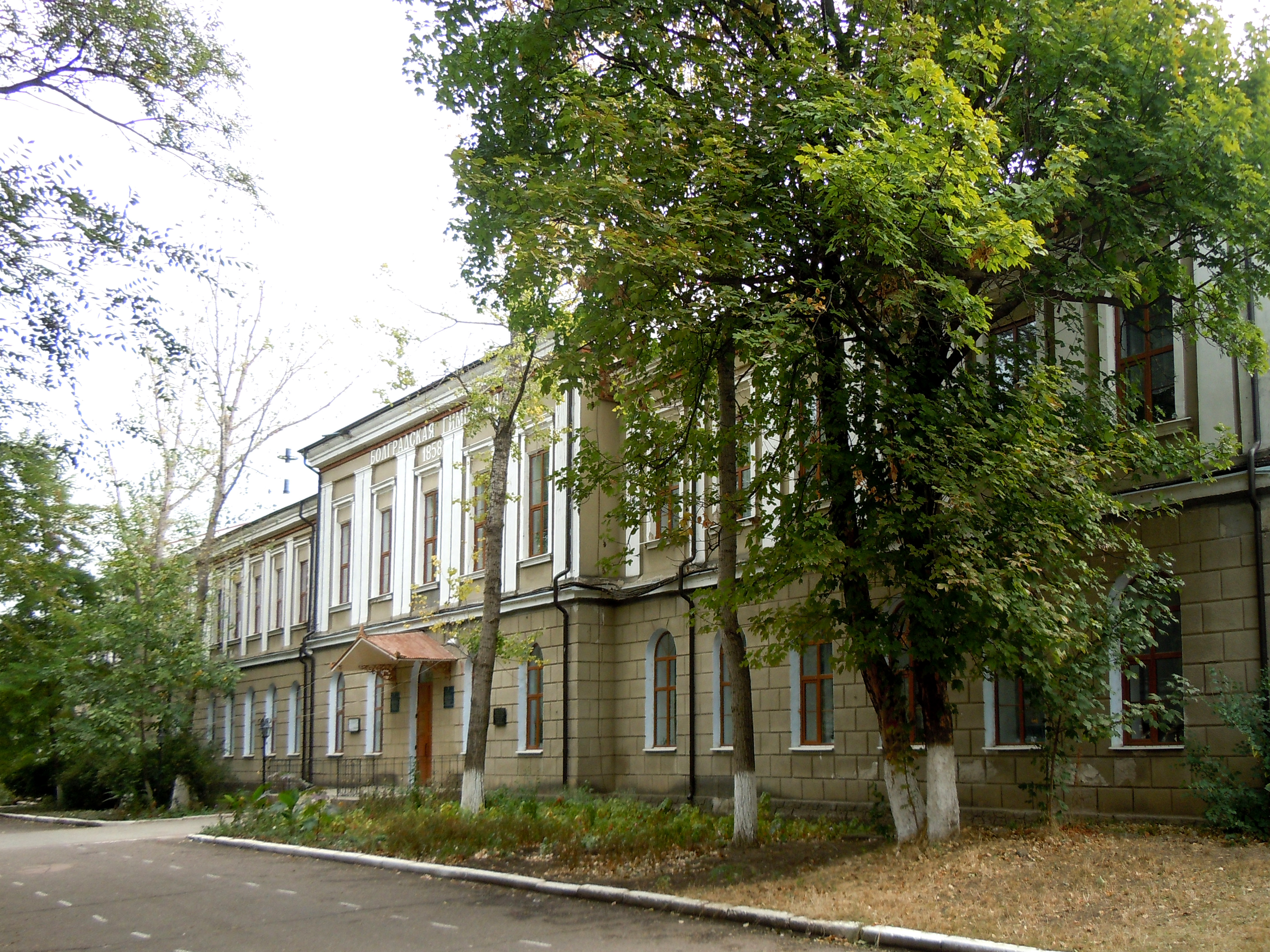 Чоловіча гімназія, Болград, 28 червня пл., 1